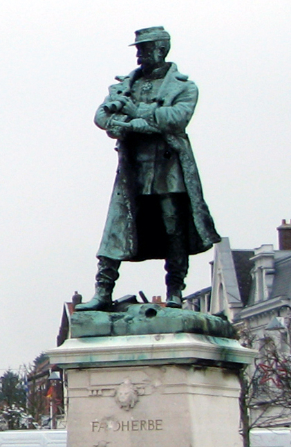 Bapaume (Pas-de-Calais, France) - La statue de Faidherbe sur la place de l'hôtel-de-ville. .